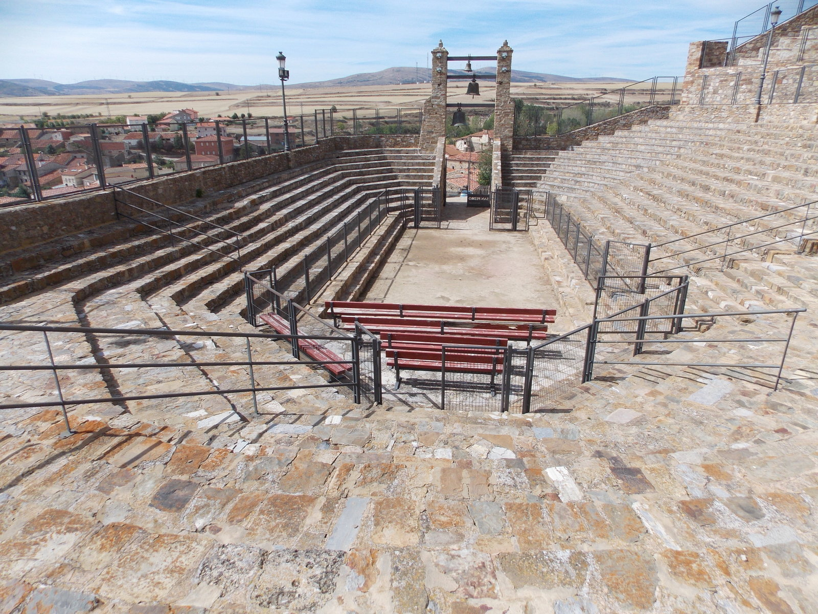 Recinto donde se realiza el paso del fuego, en San Pedro Manrique (Soria - España)